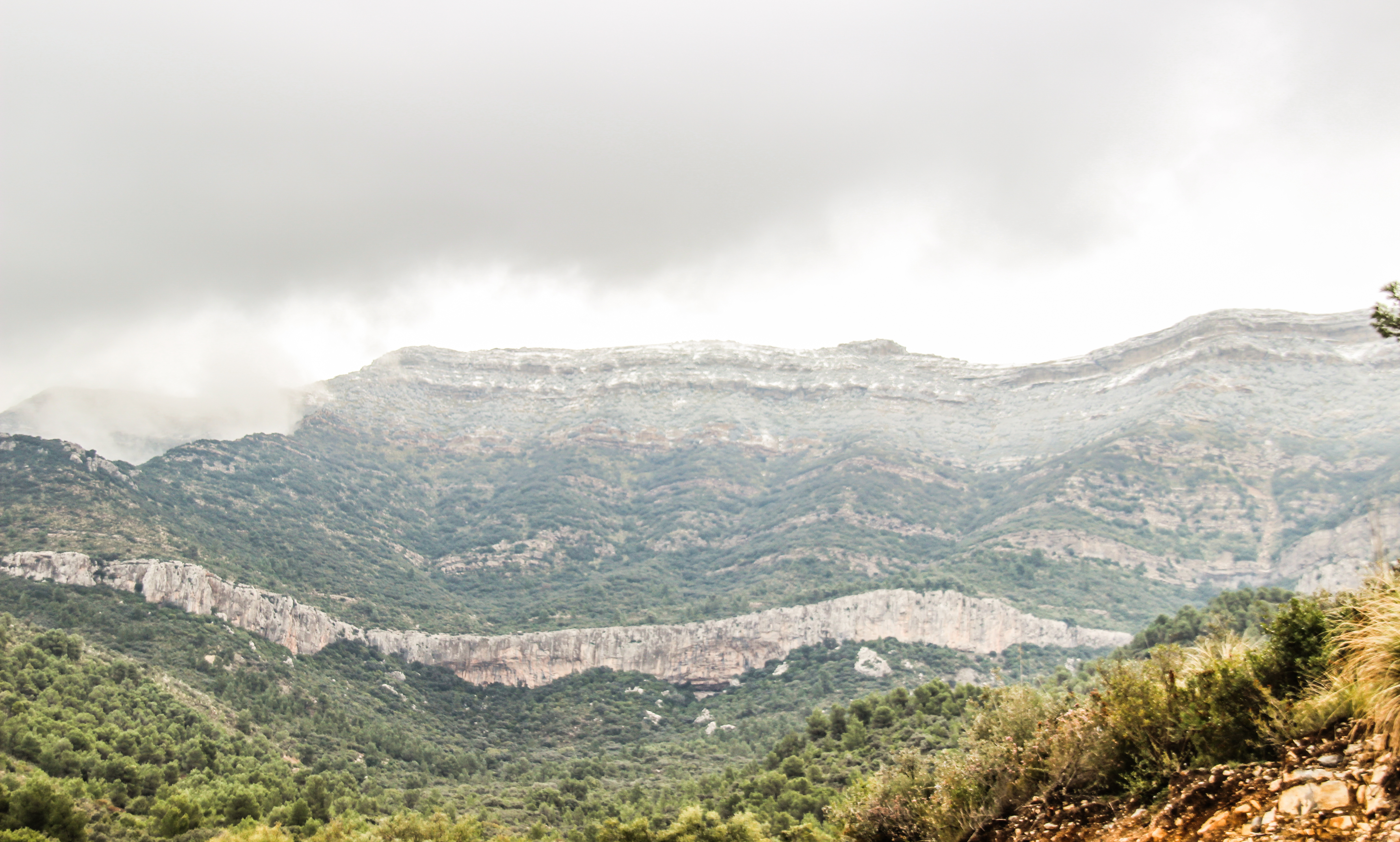 Parc national de Jebel Serj